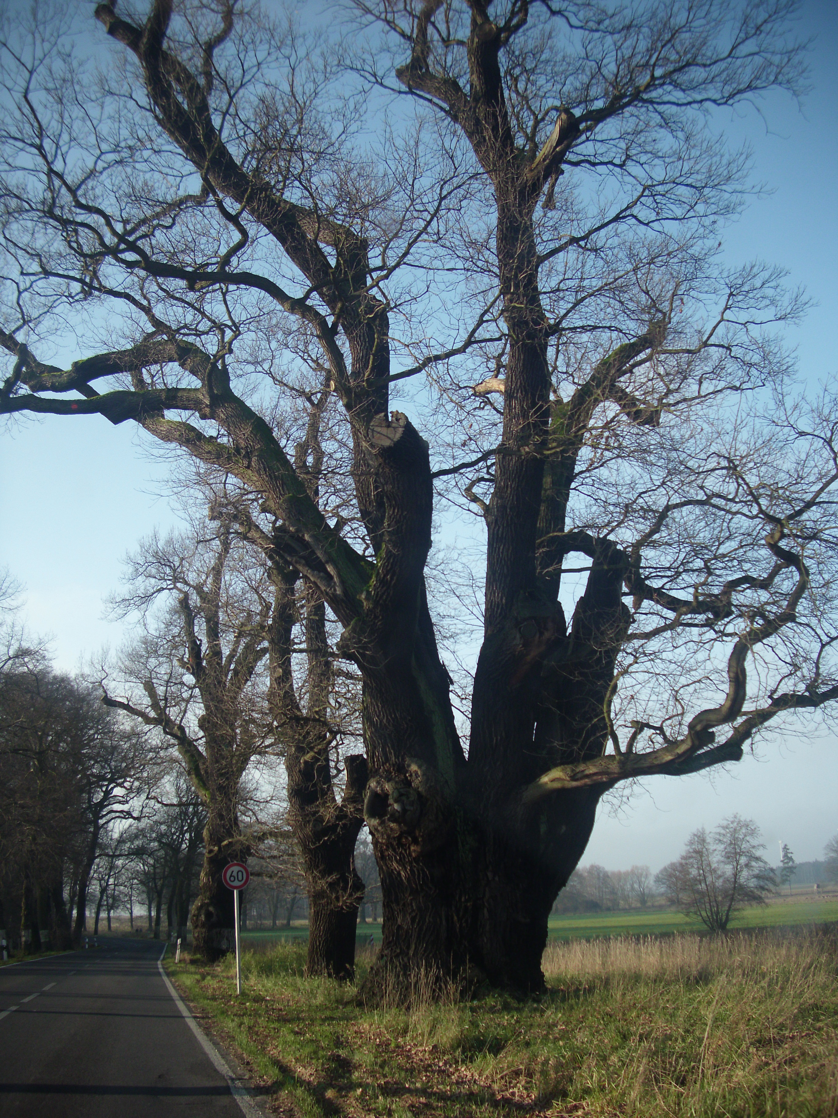 Naturdenkmal Krügersdorfer Eichen, Krügersdorf, Beeskow, Brandenburg – Die Eichen stehen an der B246. Die Eiche im Vordergrund trägt eine „Naturschutzeule“. Weitere befinden sich an einem Feldweg in Richtung Beeskow. Die „dicke Eiche“ von Krügersdorf hat einen Umfang von 10,15 m. Das Alter der Eichen wurde auf 350–600 Jahre geschätzt.